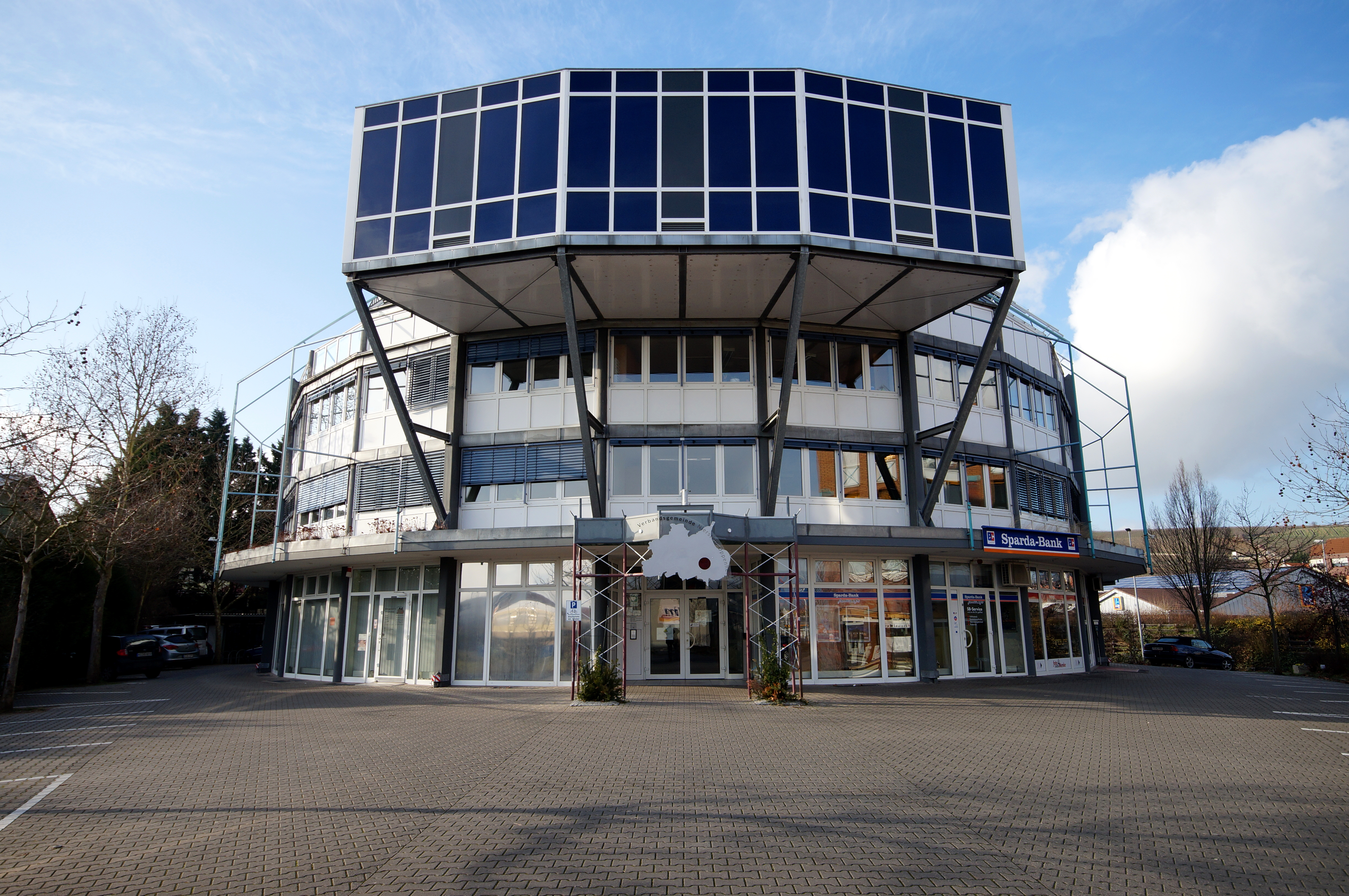 Die Verwaltung der Verbandsgemeinde Nierstein-Oppenheim (Rondo) in Oppenheim